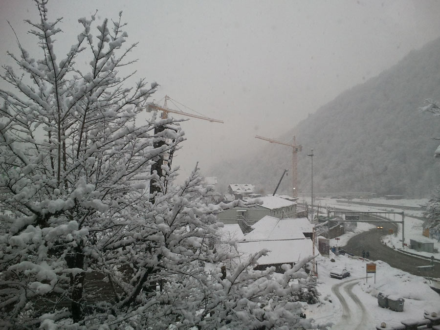 Краны POTAIN на олимпийских объектах в Имеретинской долине